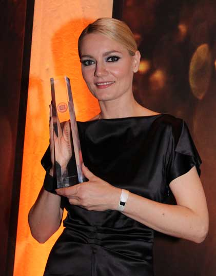 Preisträgerin Martina Hill beim Deutschen Fernsehpreis 2012